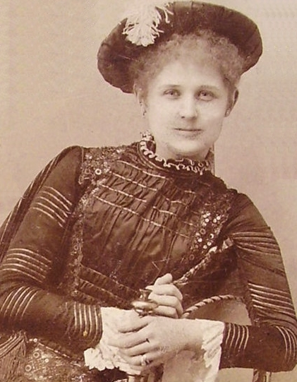 Krémer Sándorné született Bermann Irma magyar színésznő.